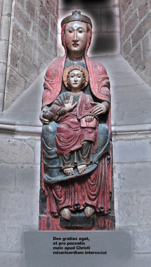 Virgen llamada "Blanca" la titular en la edad media de la catedral de Tudela de Navarra España - Romanica 1,90 mts - 6.23 pies de altura